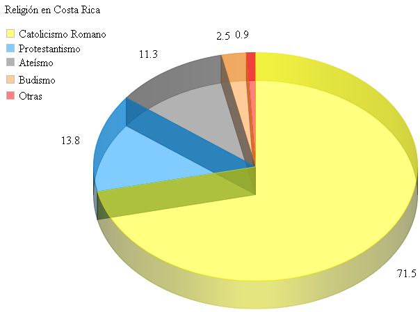 Gráfico que describe la religión en Costa Rica.